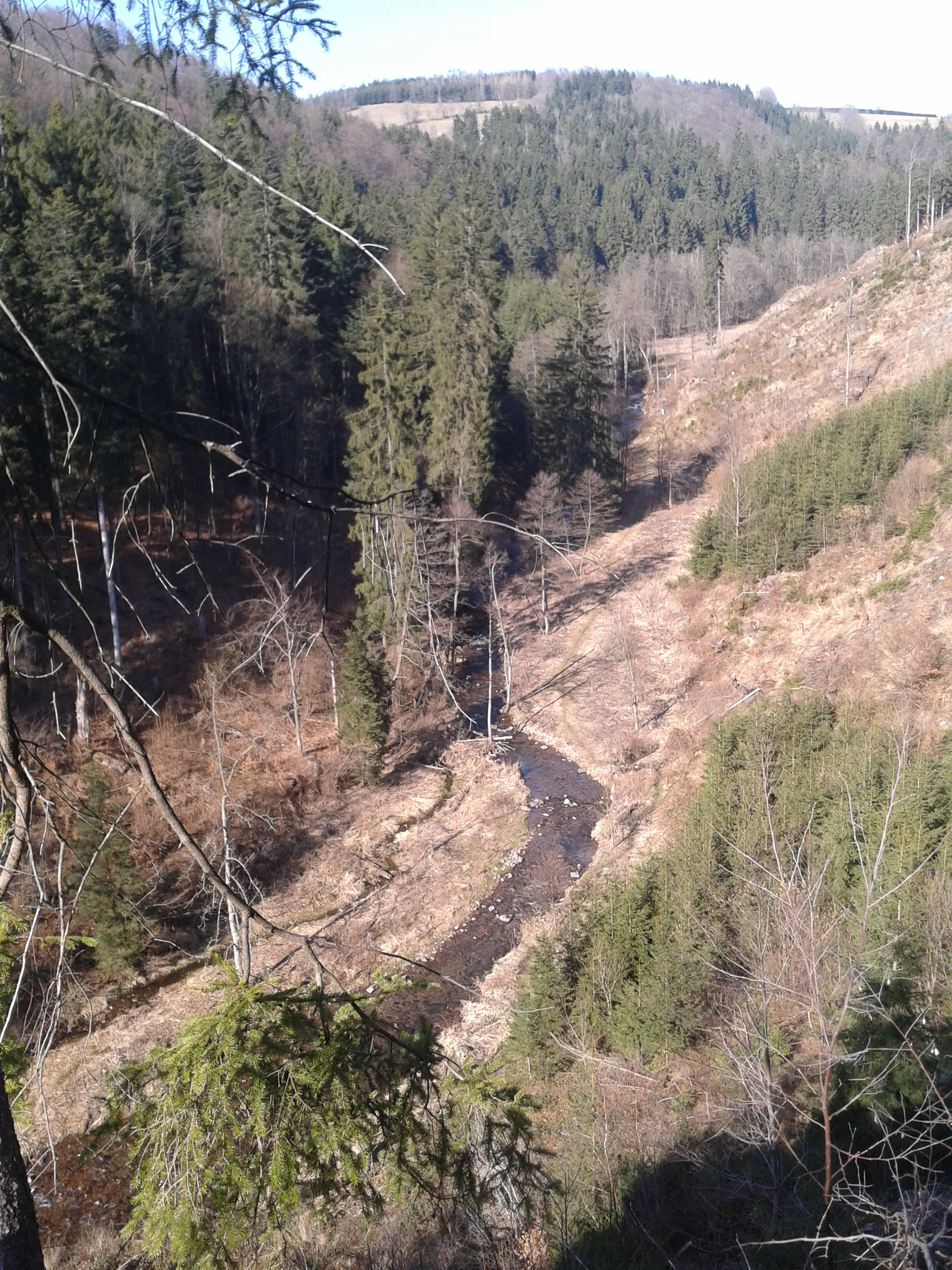 Hluboké údolí řeky Říčky